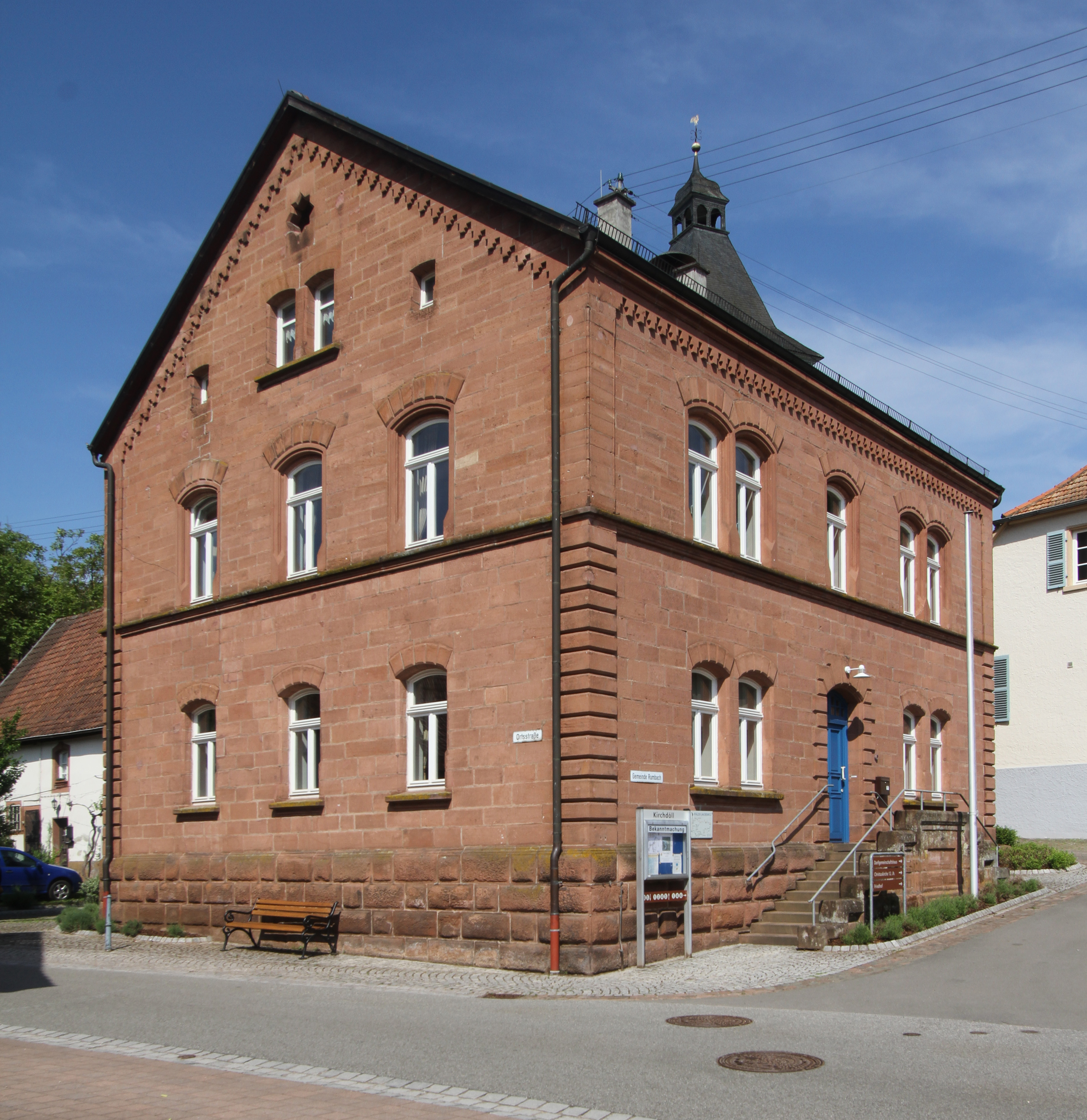 Denkmalgeschütztes Haus in Rumbach.